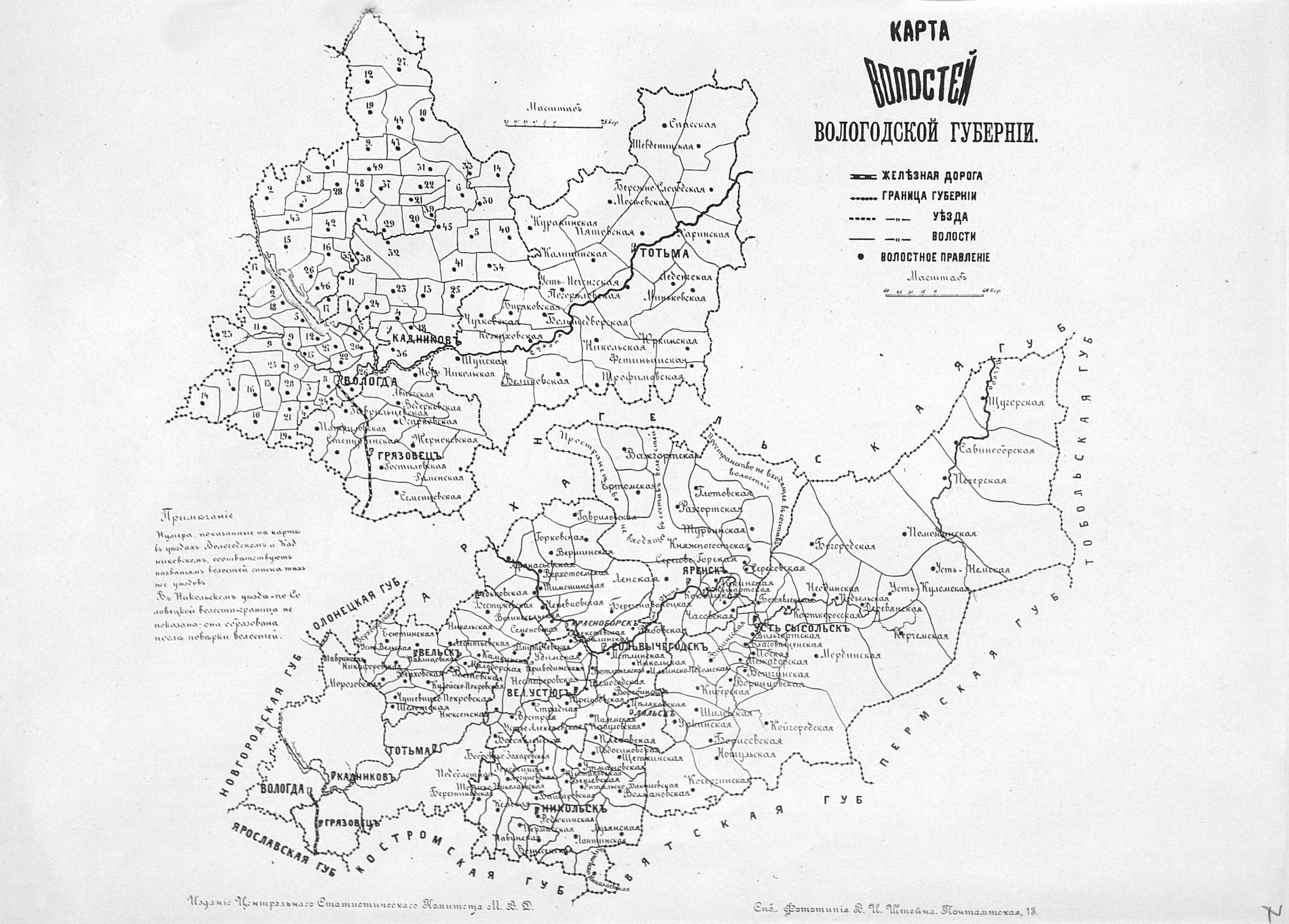 Карта волостей Вологодской губернии